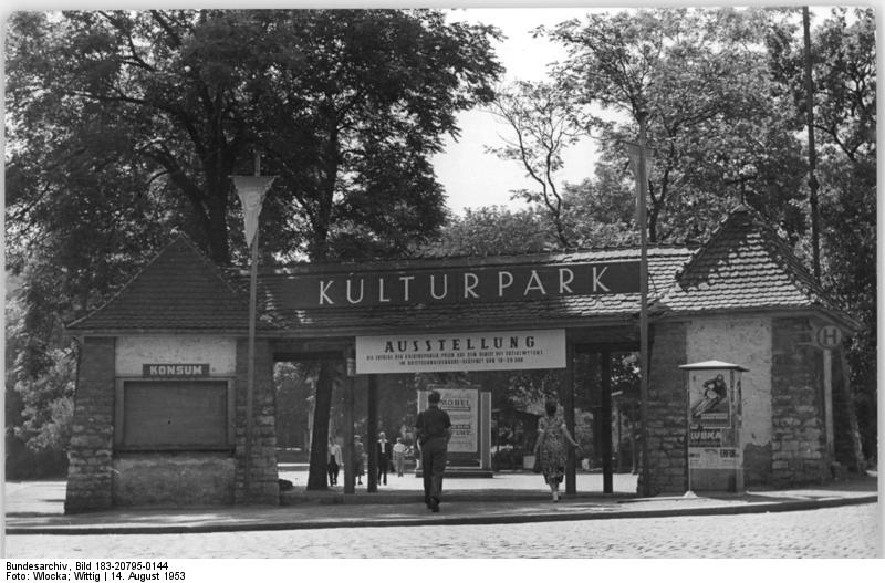 Erfurt, Kulturpark auf der Cyriaksburg, Eingang Zentralbild Wlocker-Wittig 14.8.1953 Str.-Ho. Kulturpark auf der Cyriaksburg in Erfurt. Der Eingang zum Kulturpark.